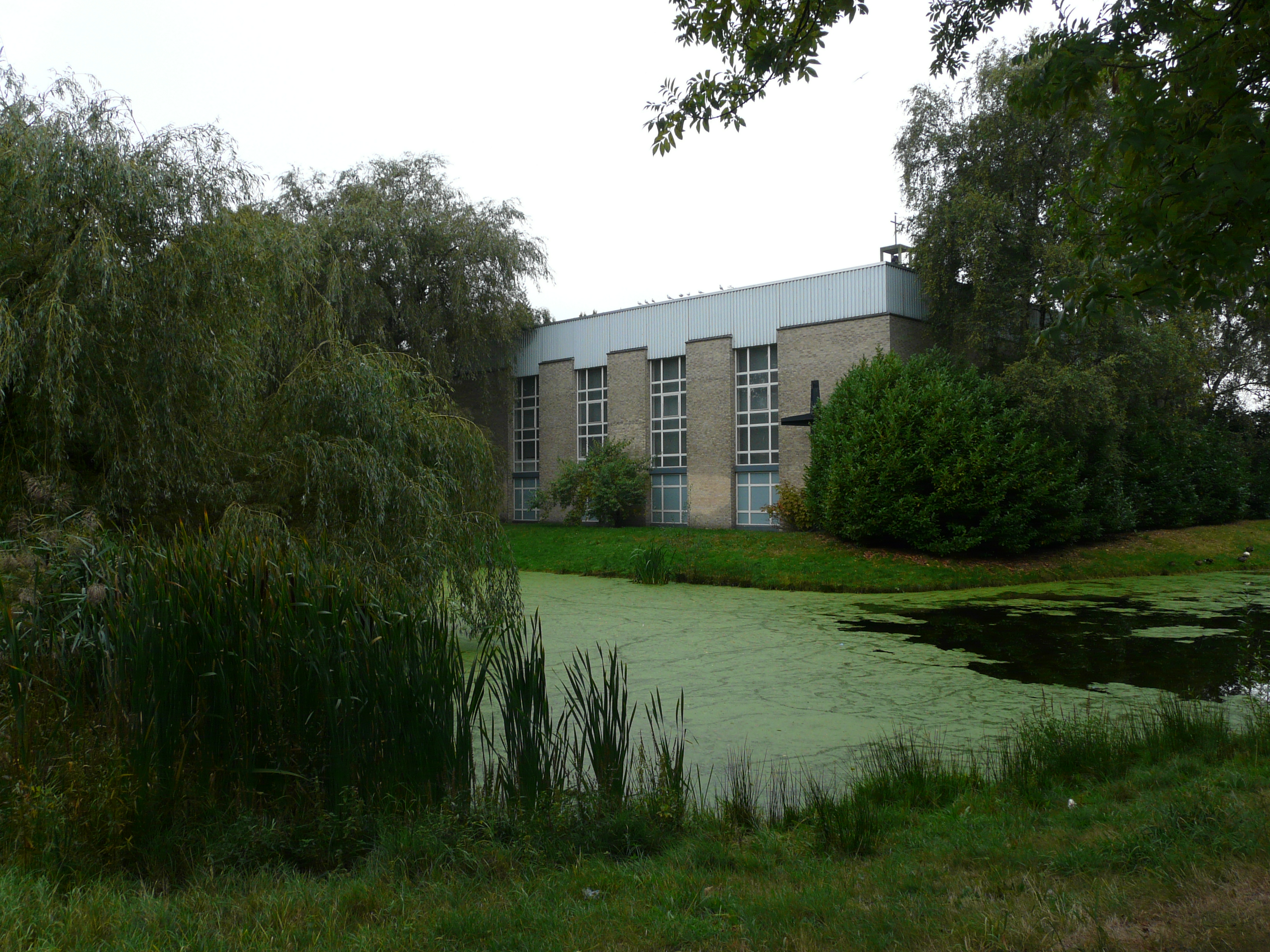 Zicht op een deel van de Heilige Franciscuskerk gevestigd aan het Belgieplein 6 in Breda